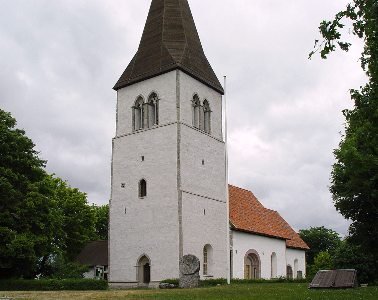 Eke-Kirche auf Gotland. Chor und Langhaus Mitte 13.Jh., Turm um 1300